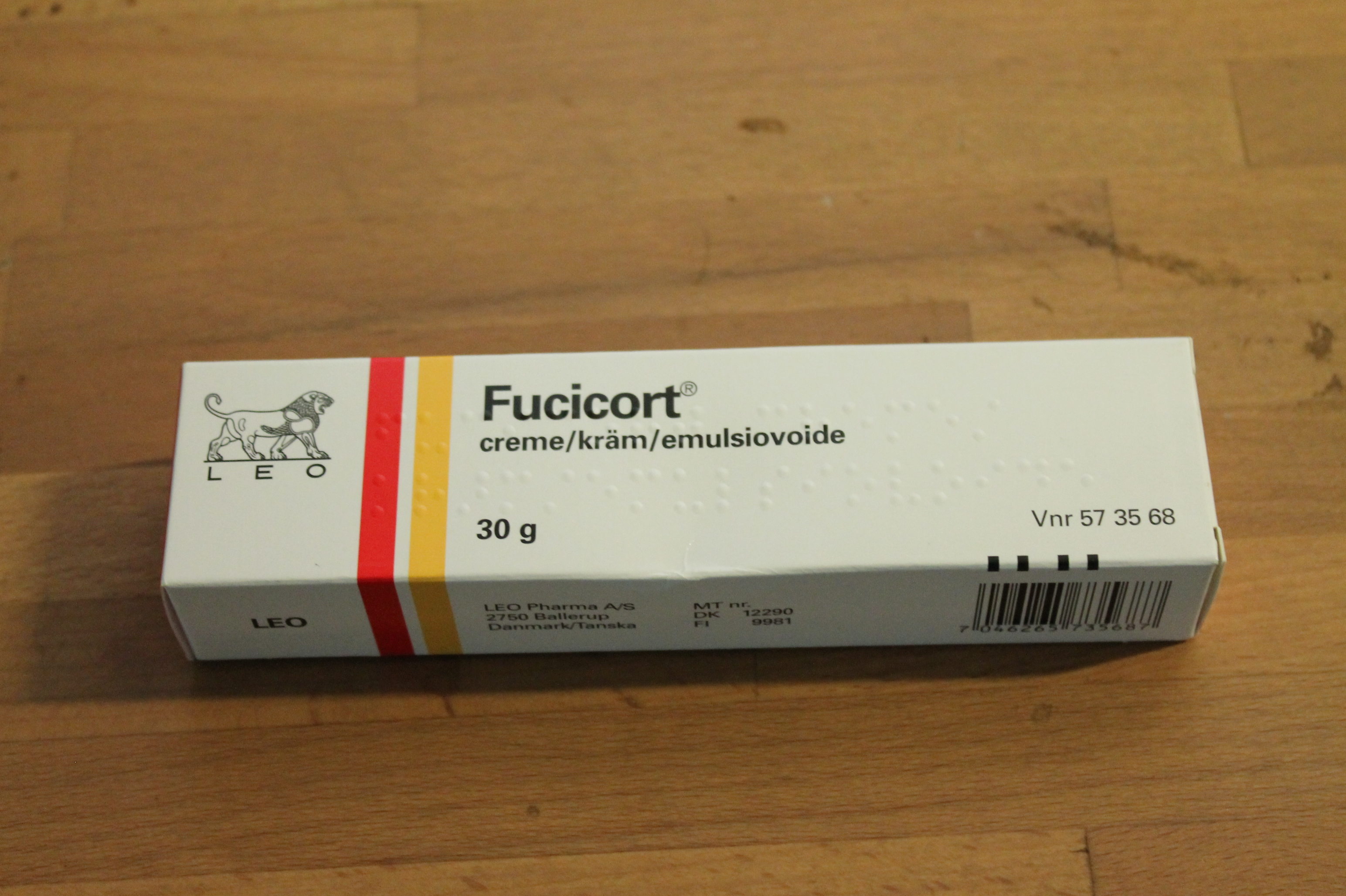 Kortisoni- ja antibioottivoide.